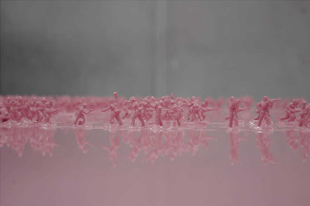 Battlefield Museum Edition Detail Nikolaus Eberstaller